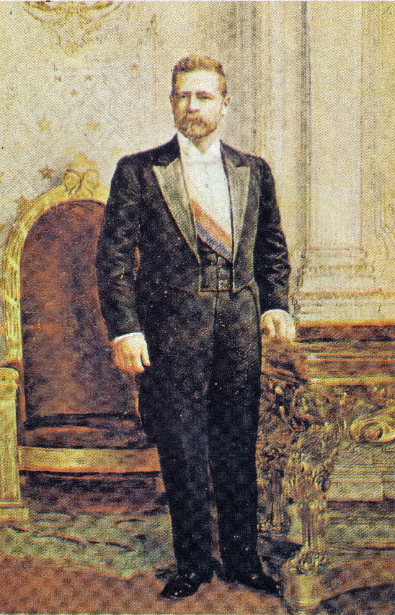 Pintura de Germán Riesco Errázuriz (Rancagua, 28 de mayo de 1854 - Santiago, 8 de diciembre de 1916). Presidente de Chile. Sobrino del Presidente Federico Errázuriz Zañartu y primo (además de cuñado) del Presidente Federico Errázuriz Echaurren.